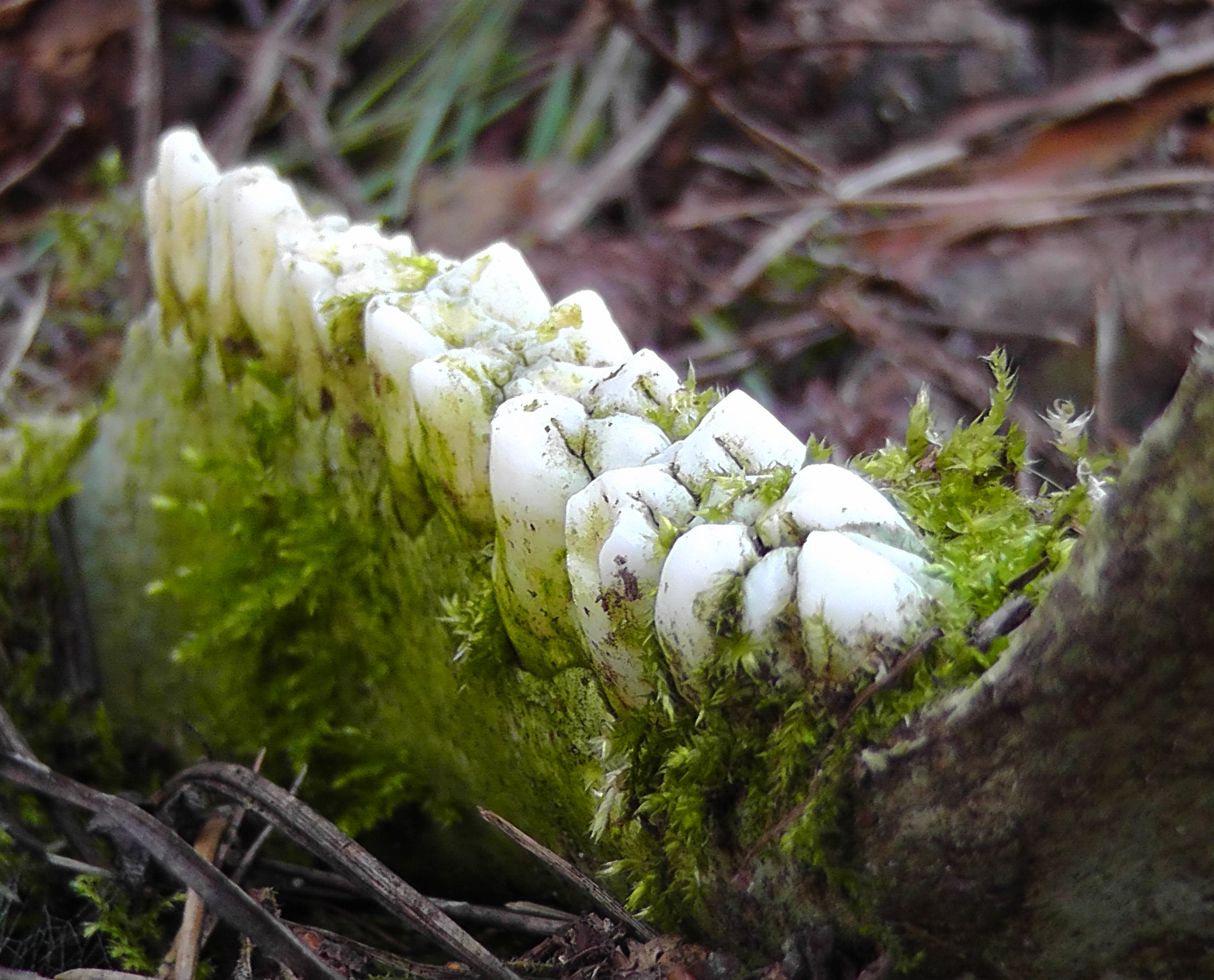 Unterkiefer eines Pflanzenfressers